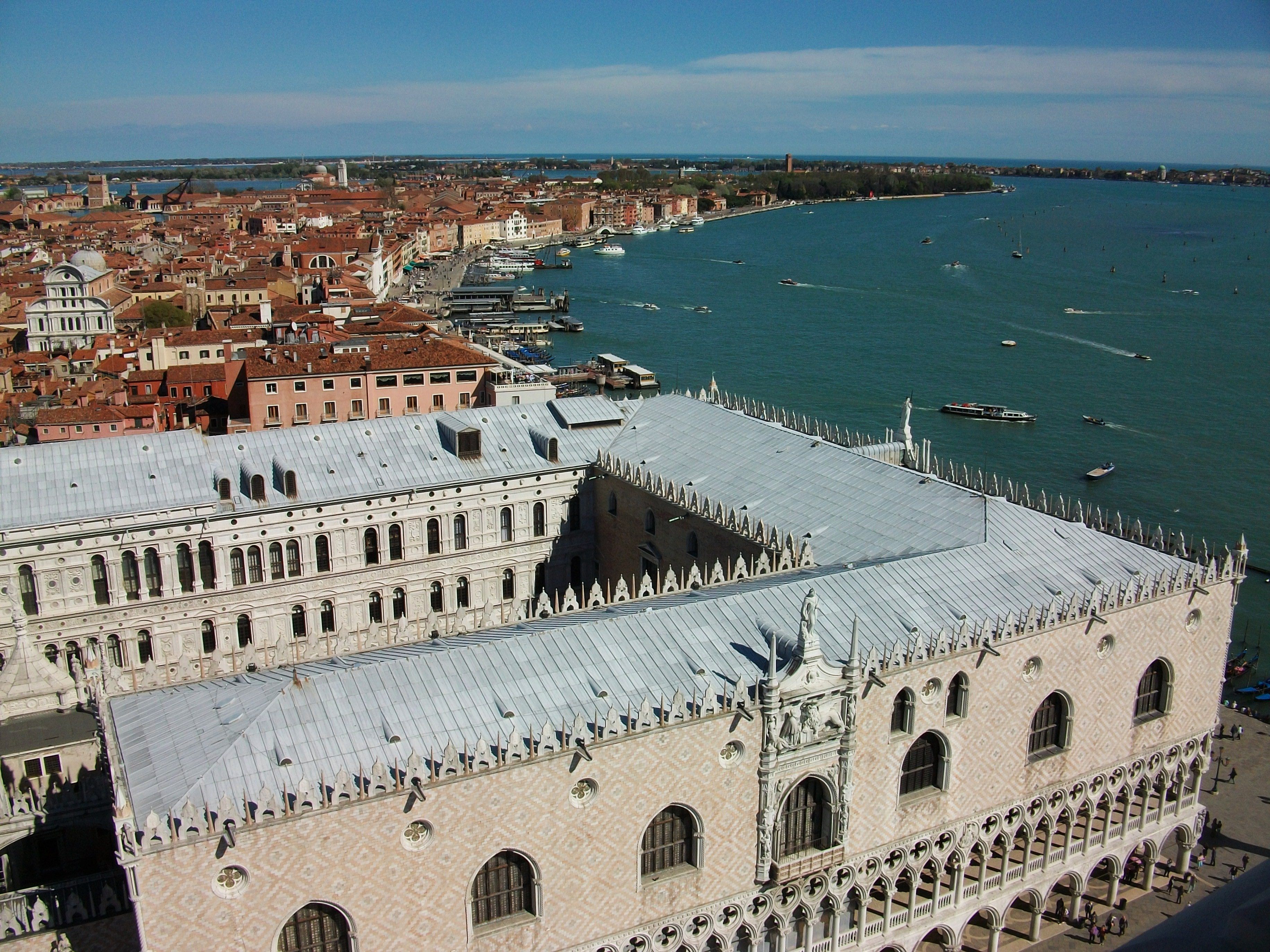 Palau Ducal des del campanar de sant Marc de Venècia.